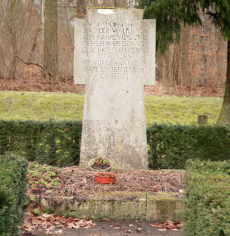 sdf